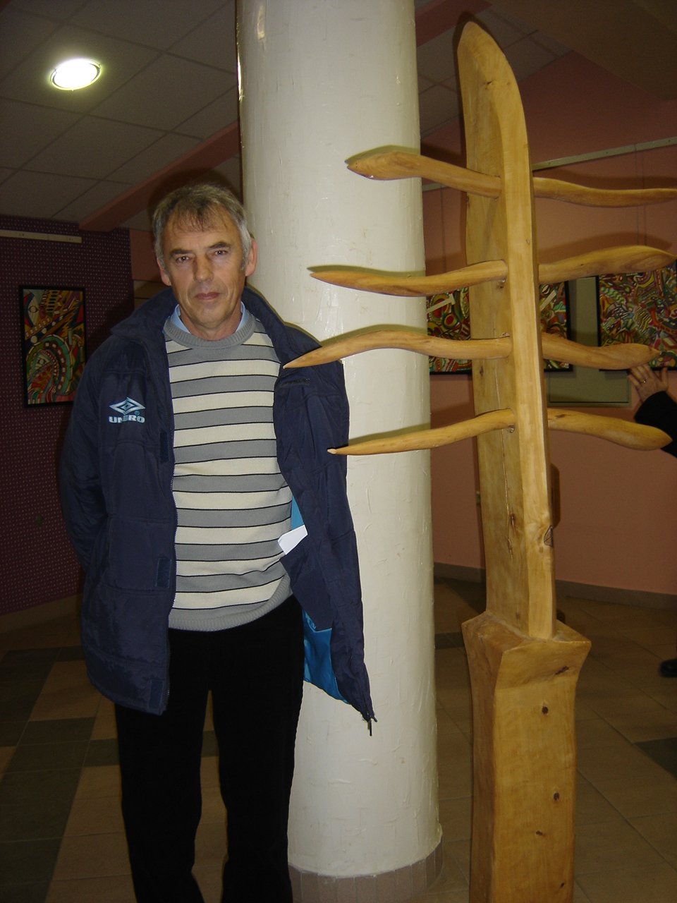 Arpad Eđed, Bilje, slike